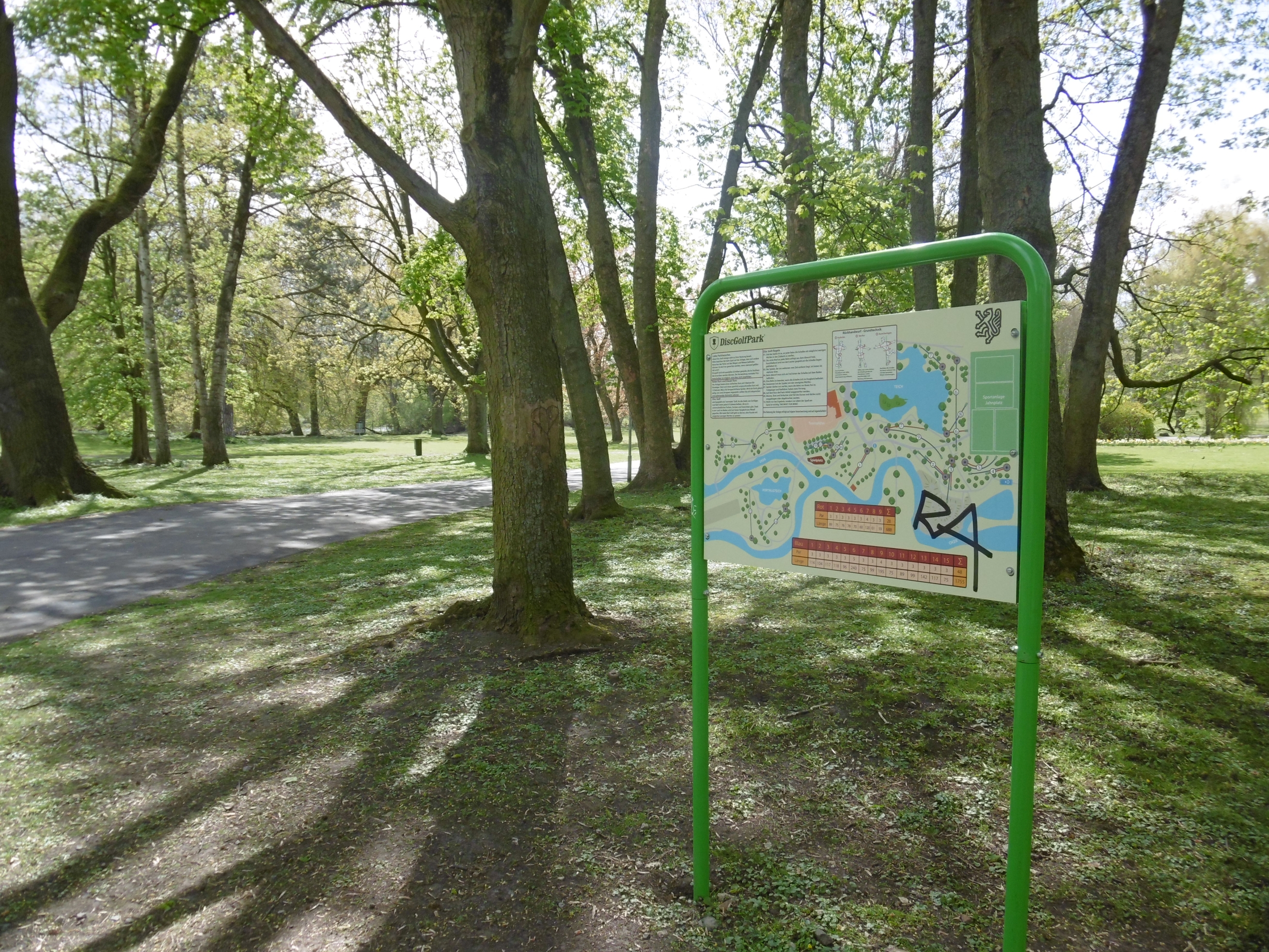 DiscGolf-Anlage im Bürgerpark - Informationstafel der Stadt Braunschweig. Blickrichtung Süden, im Hintergrund ist eine Zielstation erkennbar.